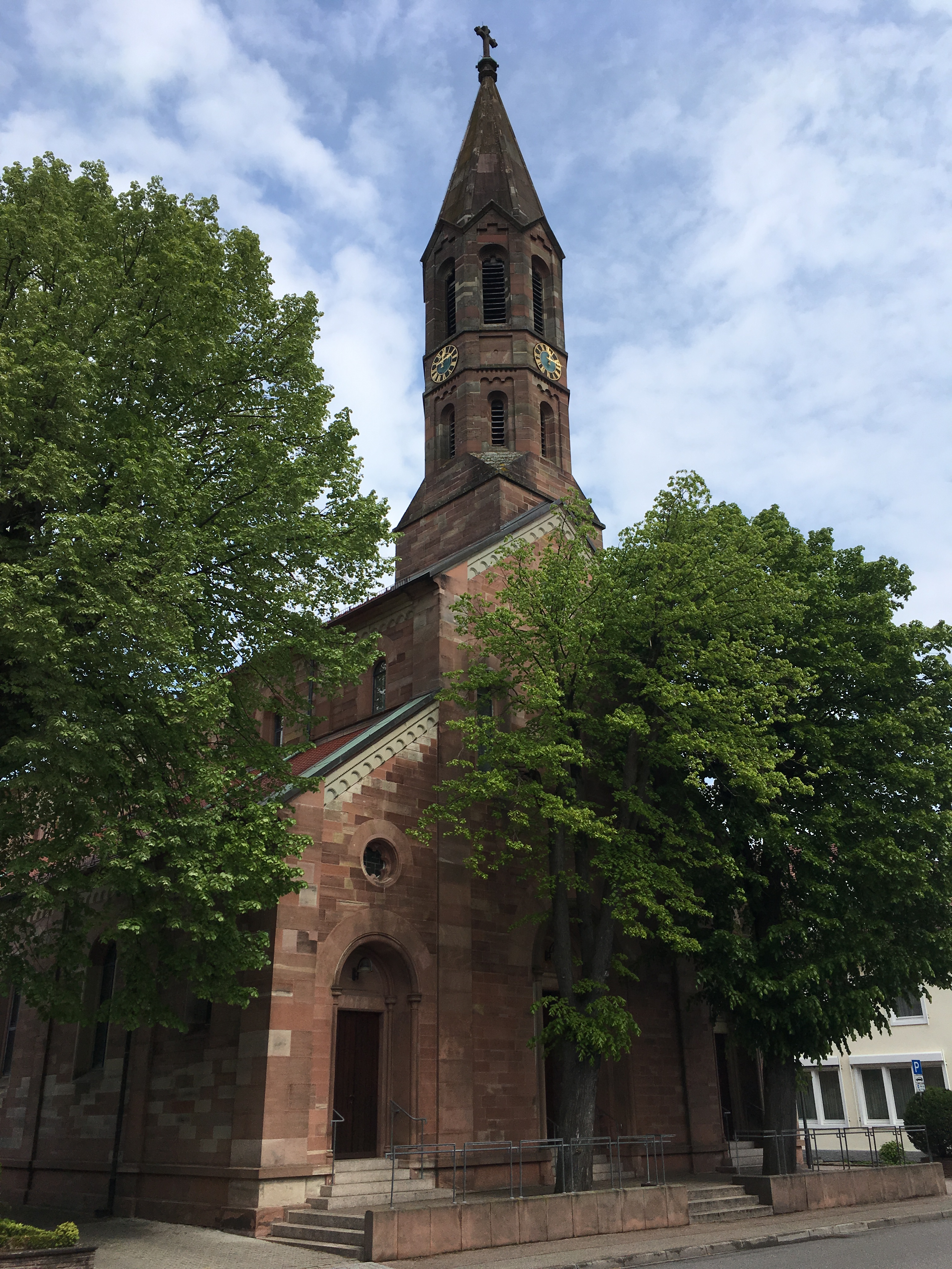 St. Laurentius ist die Pfarrkirche der Gemeinde Hügelsheim im Landkreis Raststatt in Baden-Württemberg. Die neuromanische, dreischiffige Basilika entstand in den Jahren 1842 bis 1843.